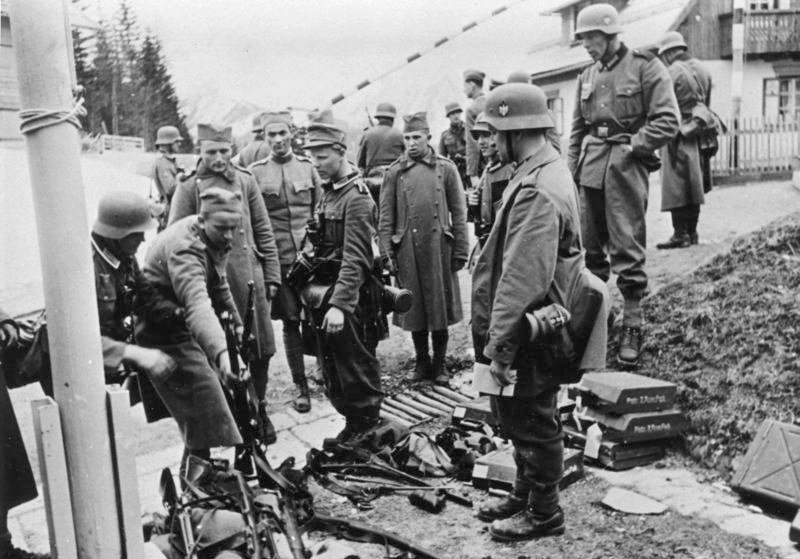 Heeresfilmstelle Serbische Gefangene liefern nach ihrer Gefangennahme die Waffen ab. Aufnahme am: 06.04.1941 Ort: Schneebergsattel Land: Jugoslavien Negativ-Nr. P.K. 129/9